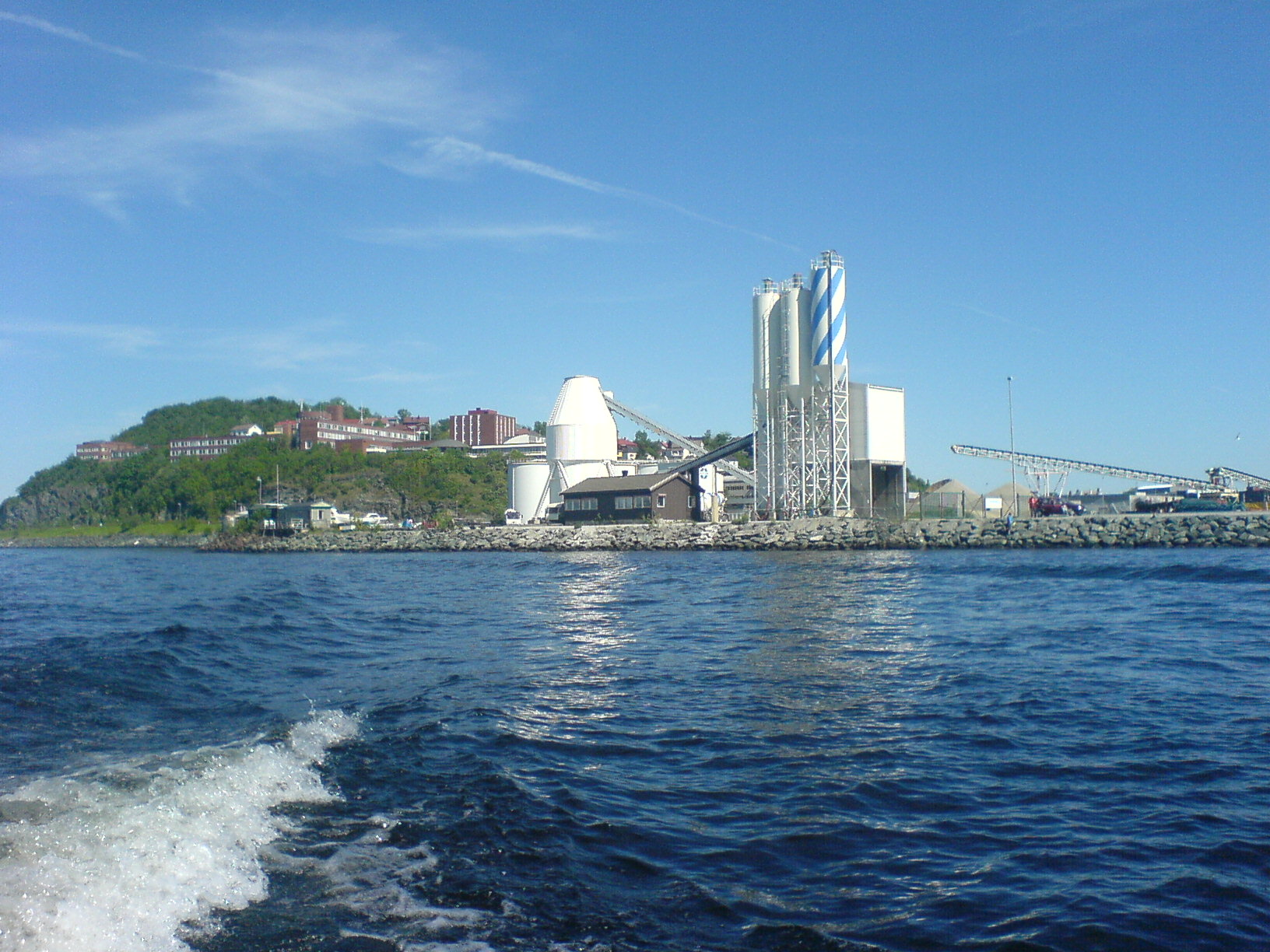 Ladehammeren in Trondheim, Norway.